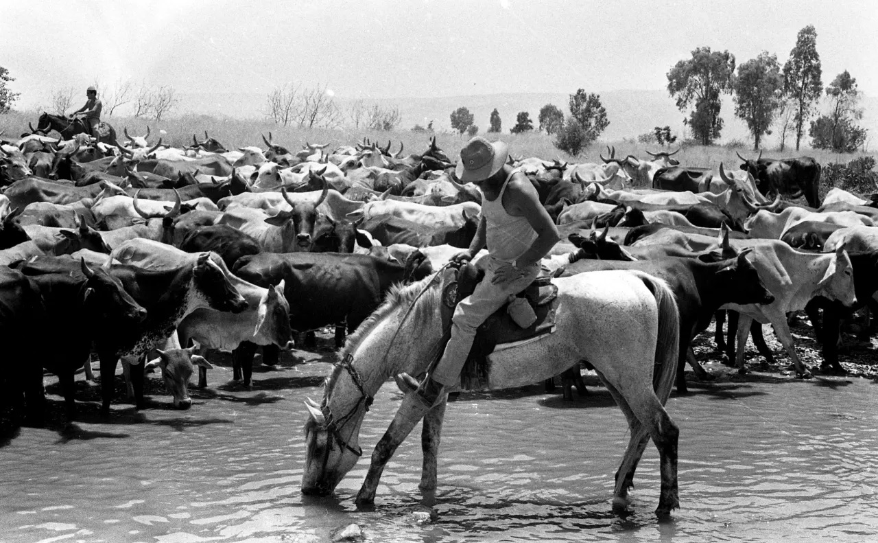 בוקרים ישראליים ברמת הגולן, 1969